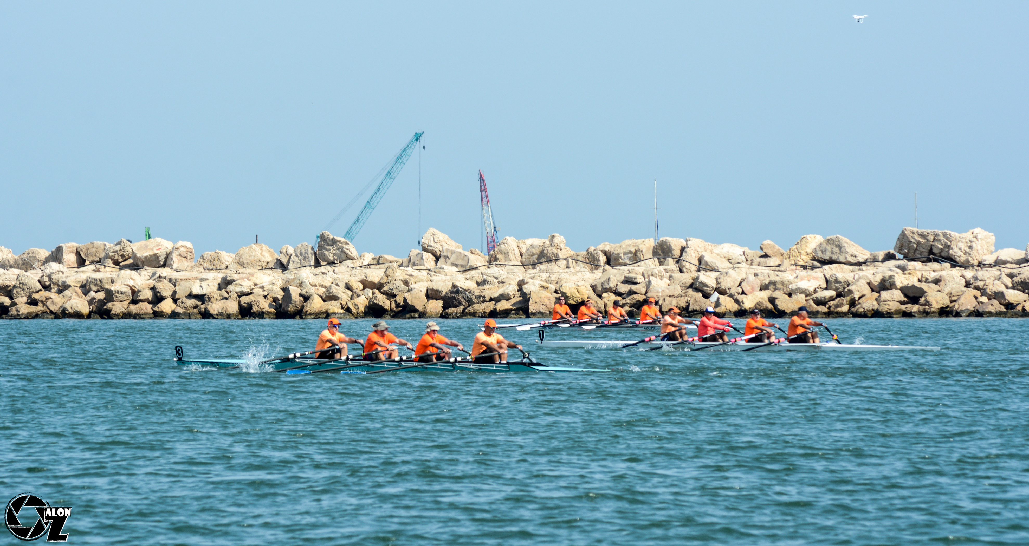 Haifa rowing club competition